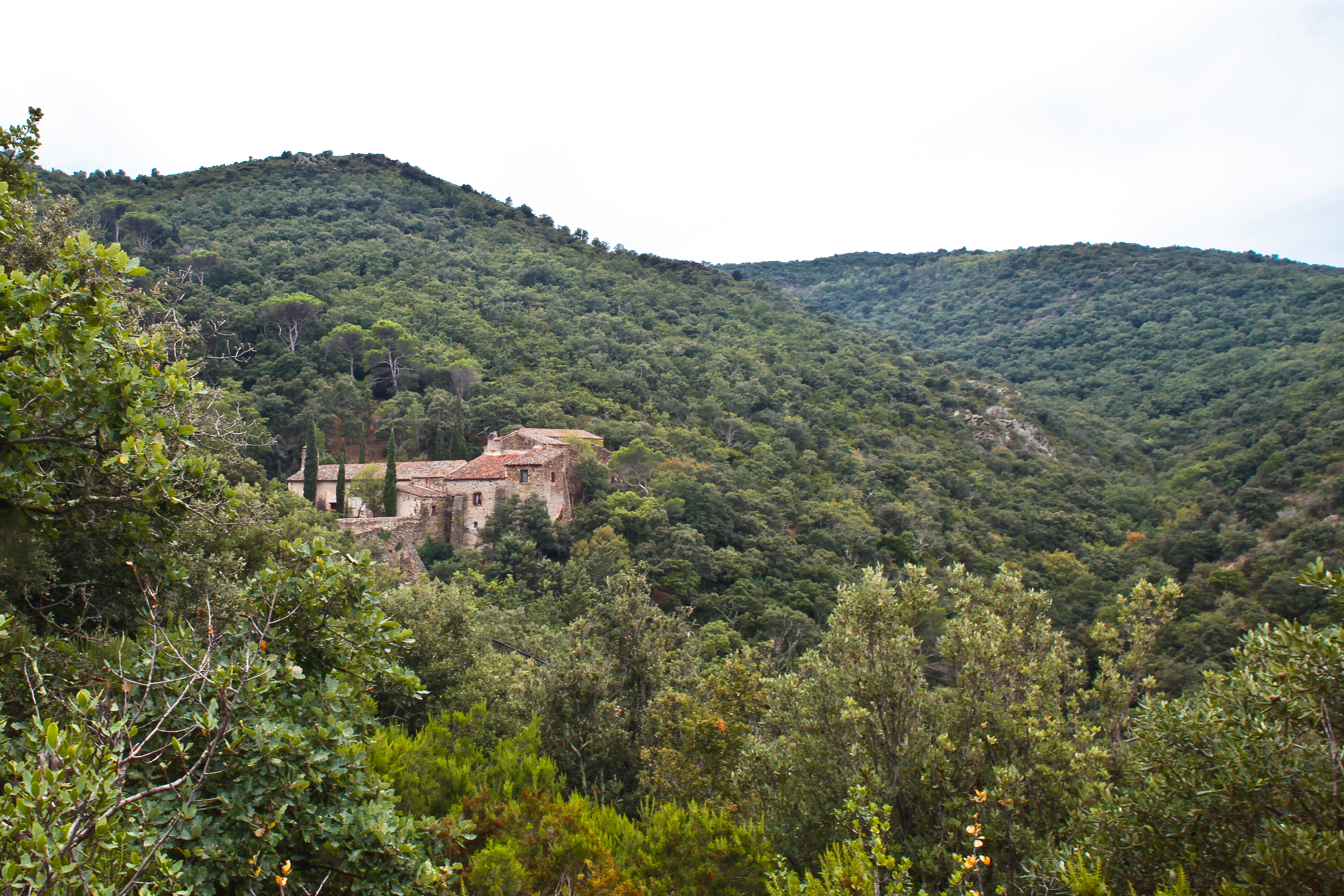 Chapelle Saint-Maurice d'Ille-sur-Têt (Inscrit) .